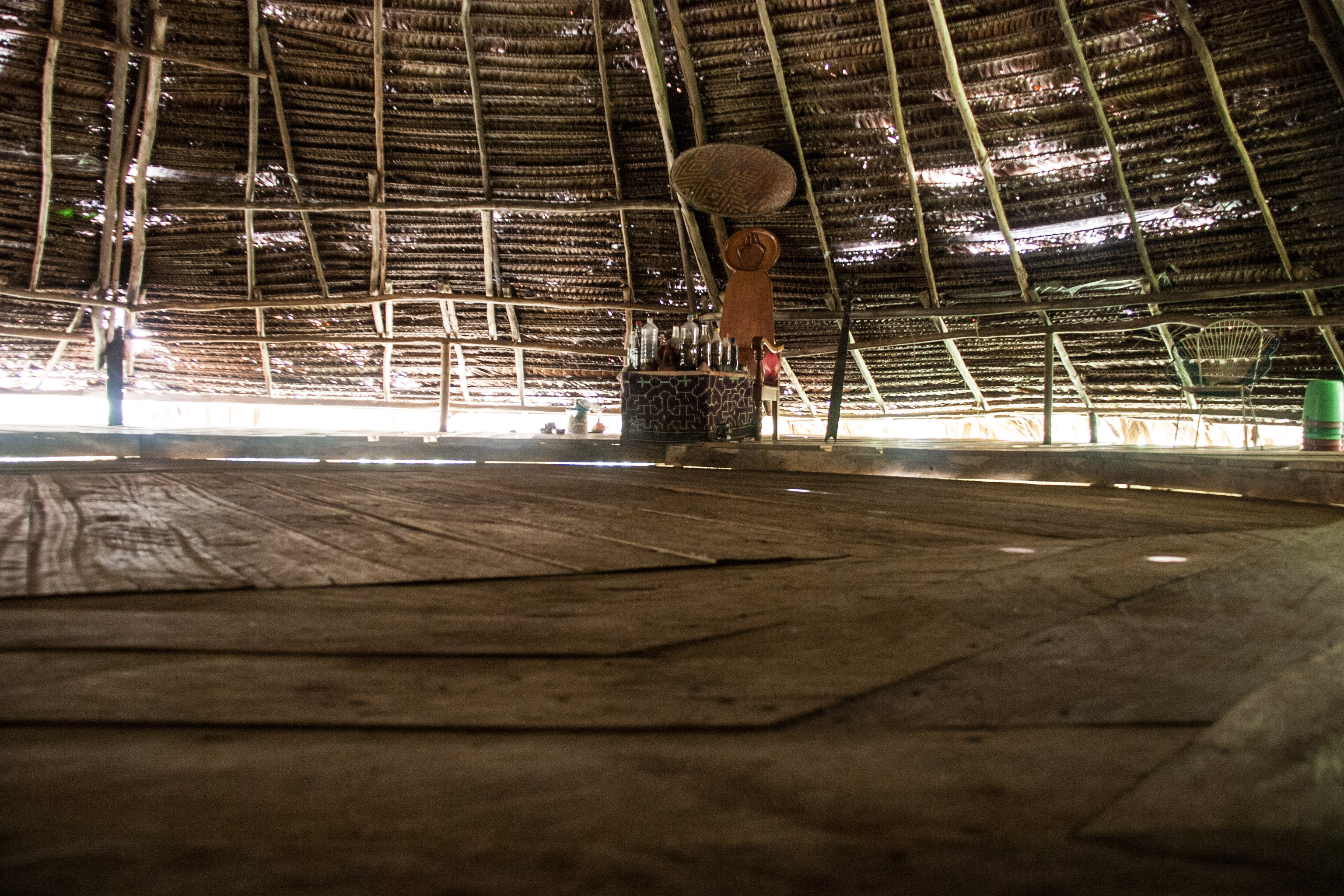 Maloca en Iquitos, Perú. Una maloca es una casa comunal ancestral, utilizada por varios pueblos en la Amazonia.